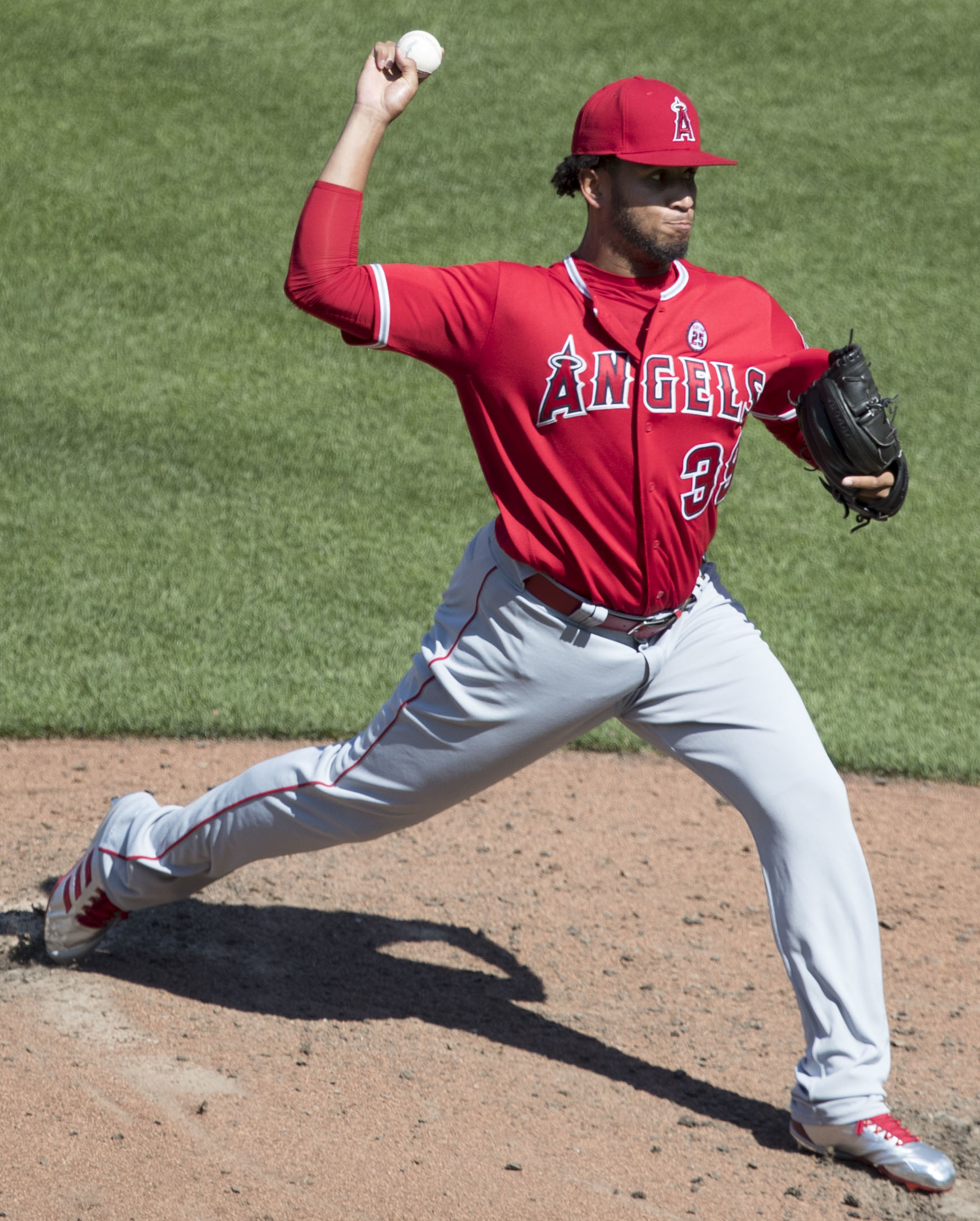 Angels at Orioles 8/20/17